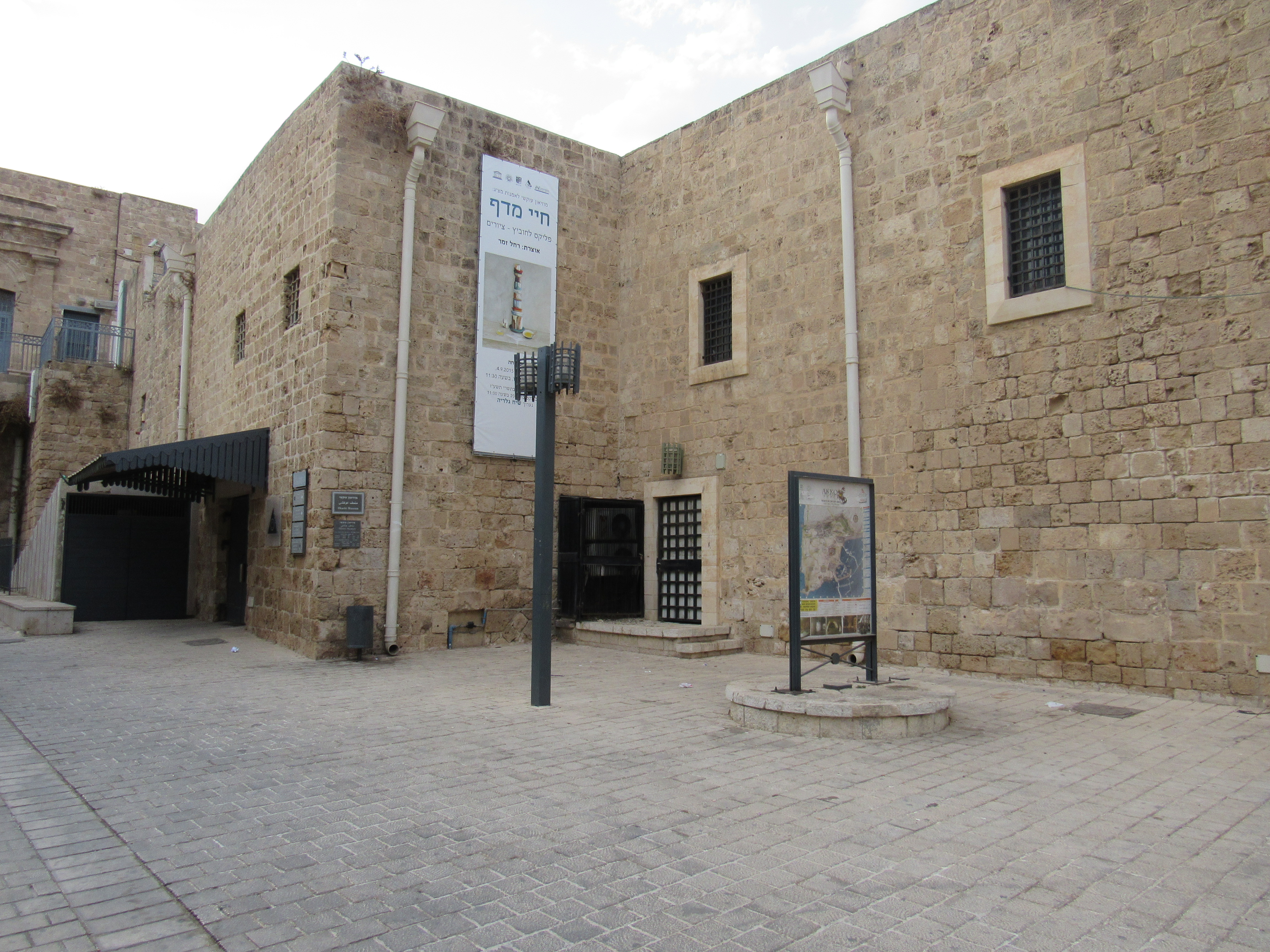 Acre